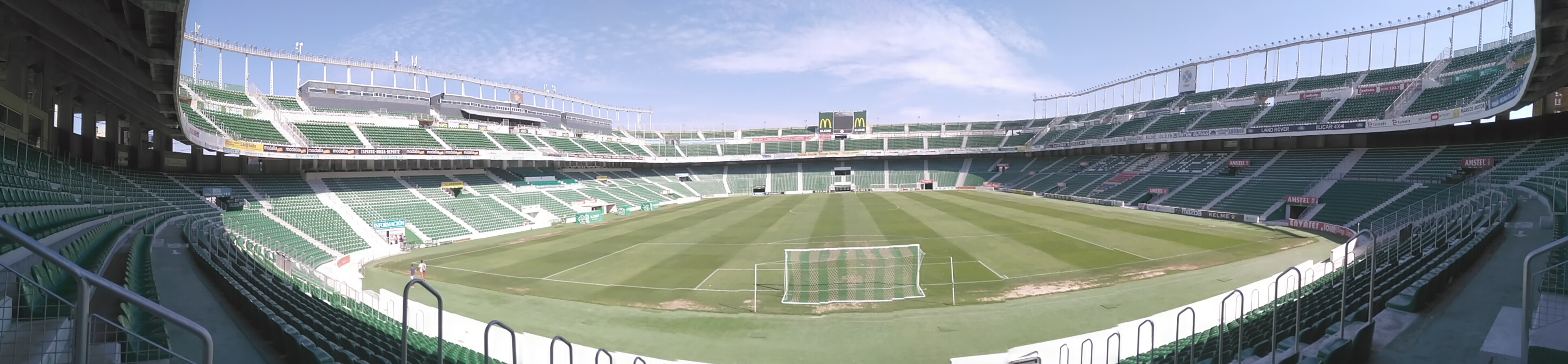 Panórámica del Estadio Martínez Valero en el año 2015